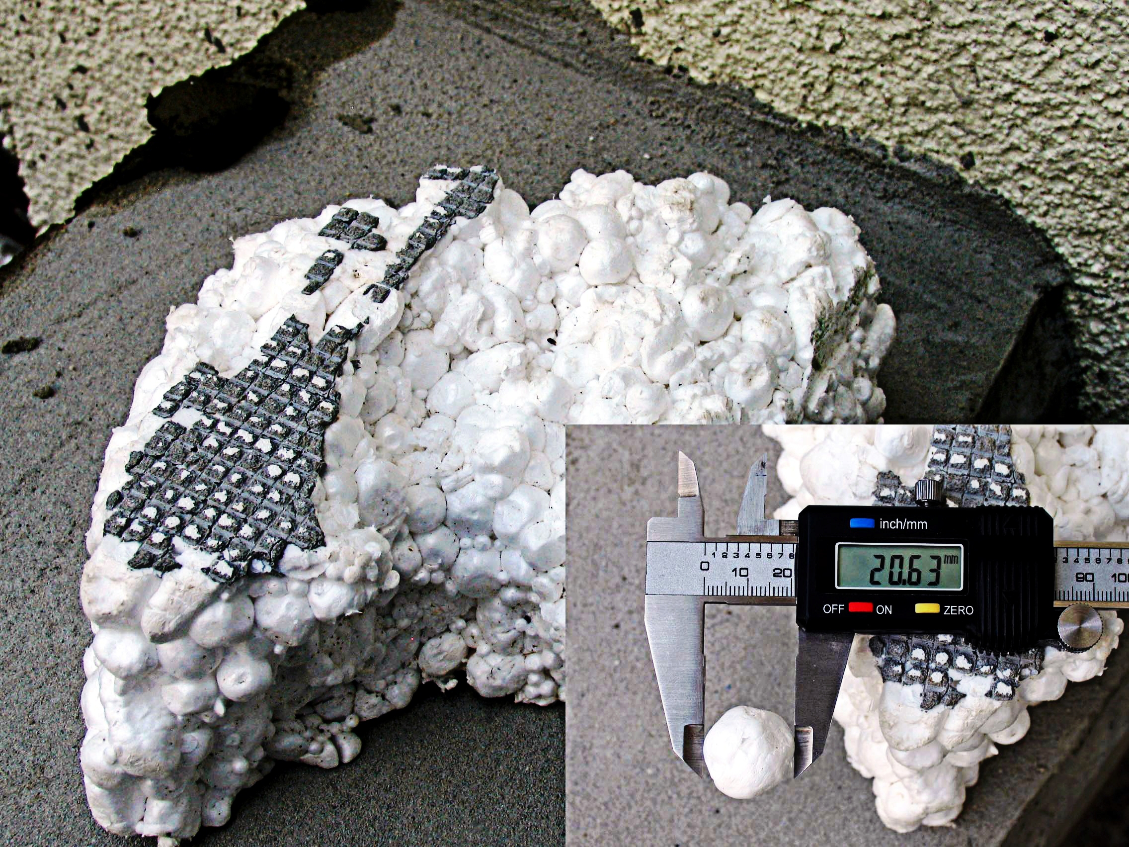 Пенополистирол